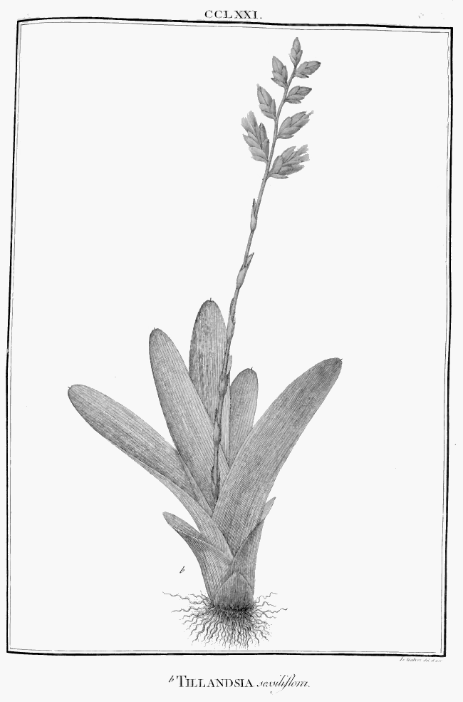 Tillandsia sessiliflora Ruiz & Pav.